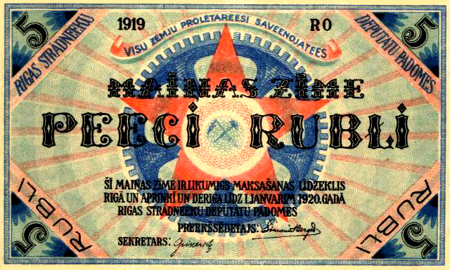 5 рублей, Латвия, 1919-1920 год.